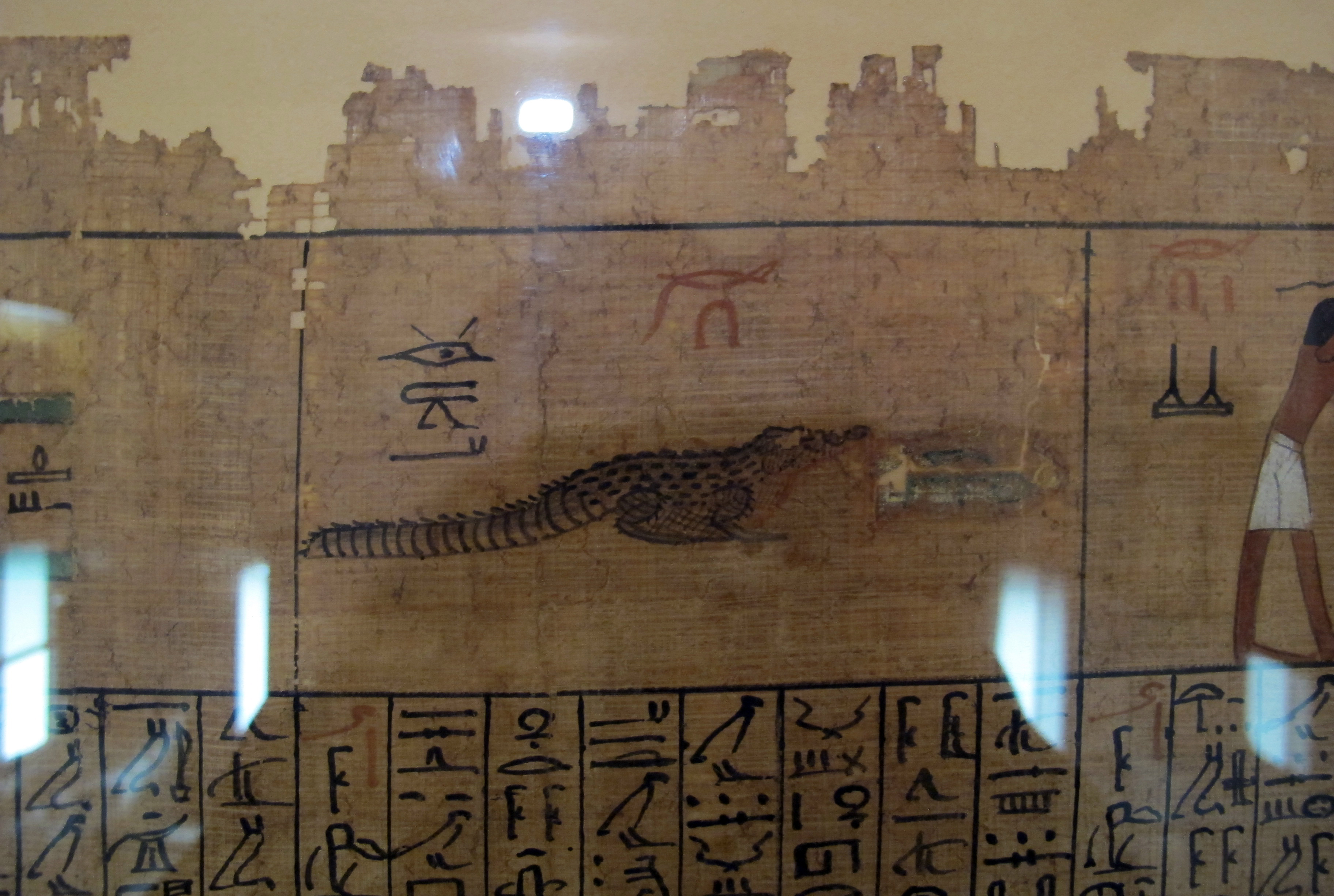 Ancient Egyptian art in the Museo archeologico nazionale (Florence)